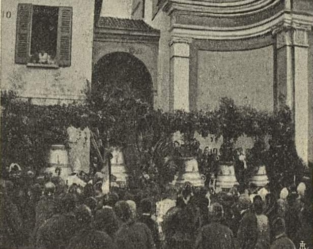 Un’istante della cerimonia di benedizione delle nuove campane della chiesa parrocchiale di Brinzio